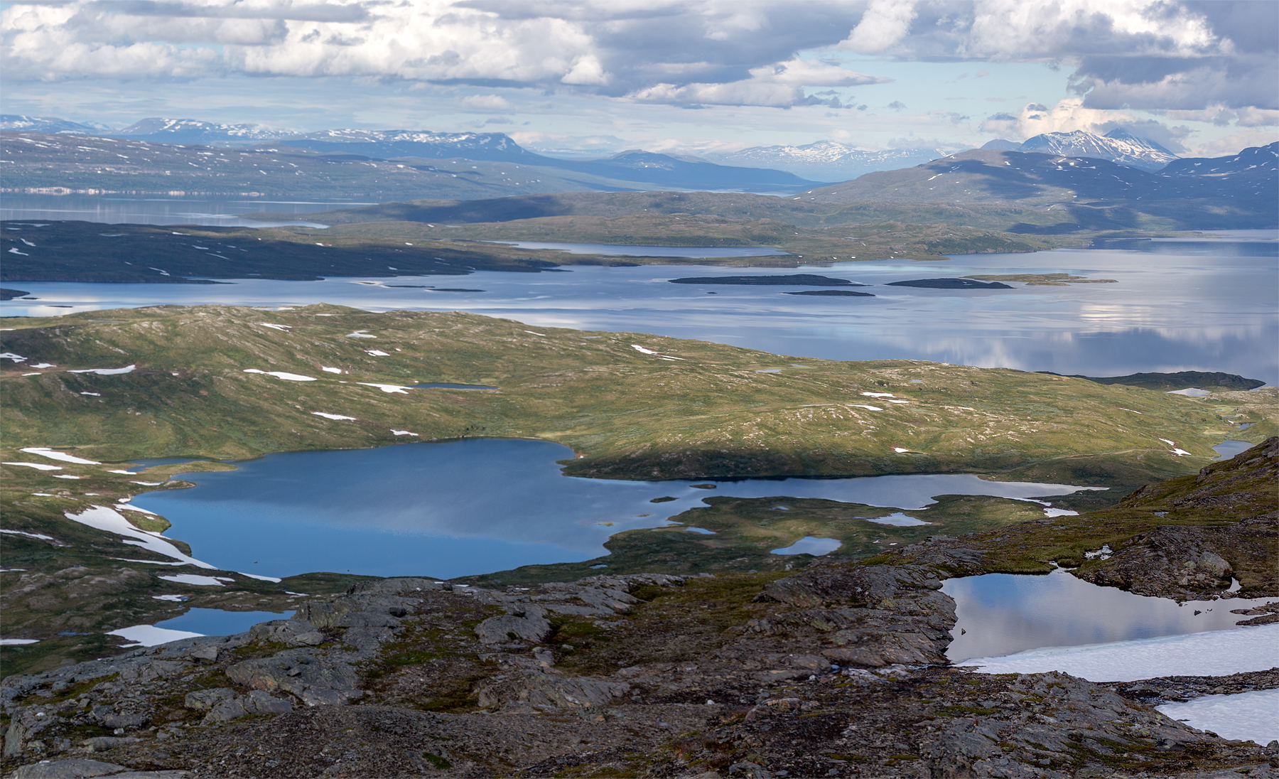 Lermajávrásj - vy från Guobllatjårro.